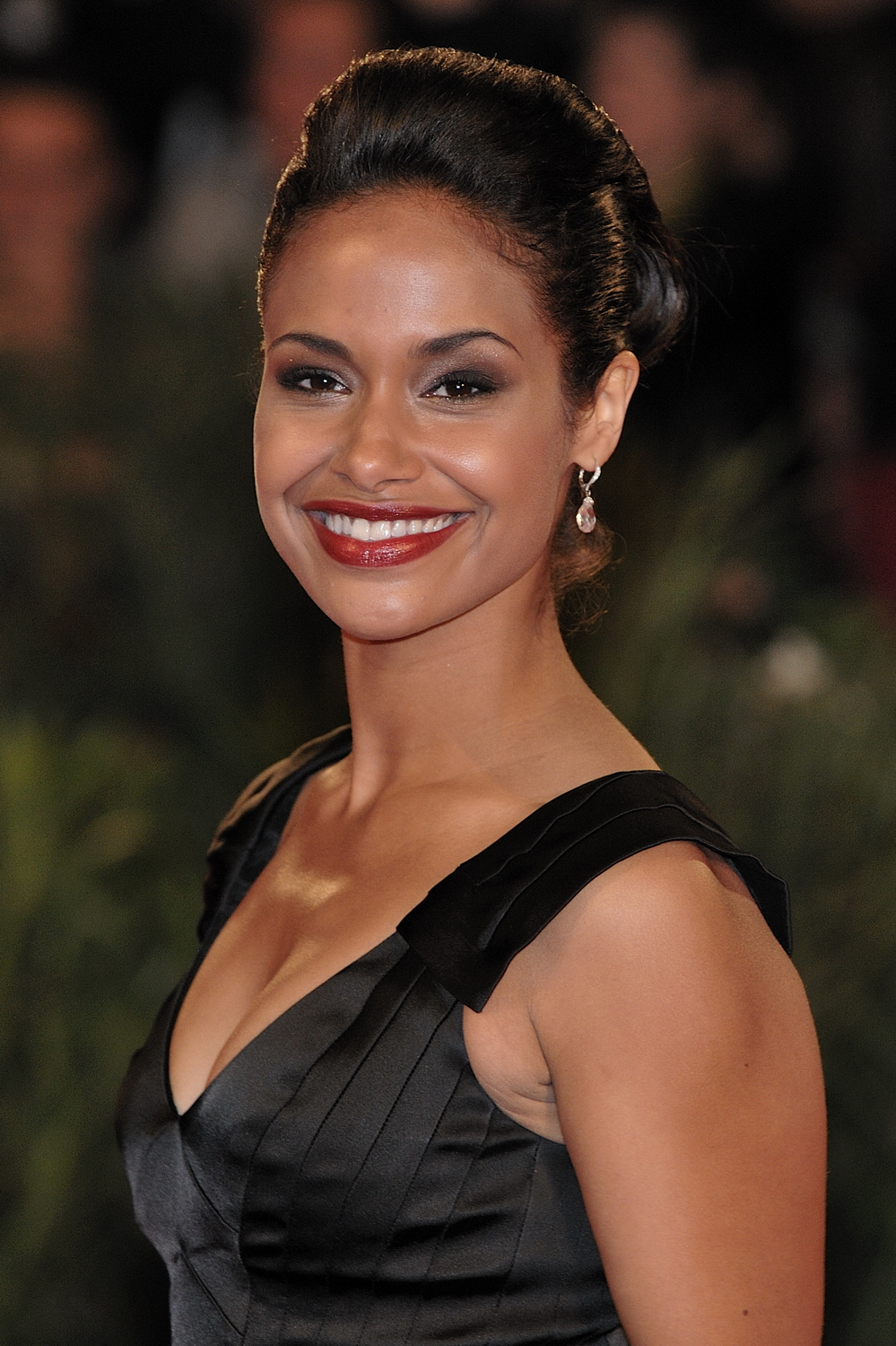 66ème Festival du Cinéma de Venise (Mostra), 8ème jour (07/09/2009) Tapis rouge avec Ethan Hawke et Wesley Snipes et le réalisateur Antoine Fuqua pour le film : Brooklyn's finest